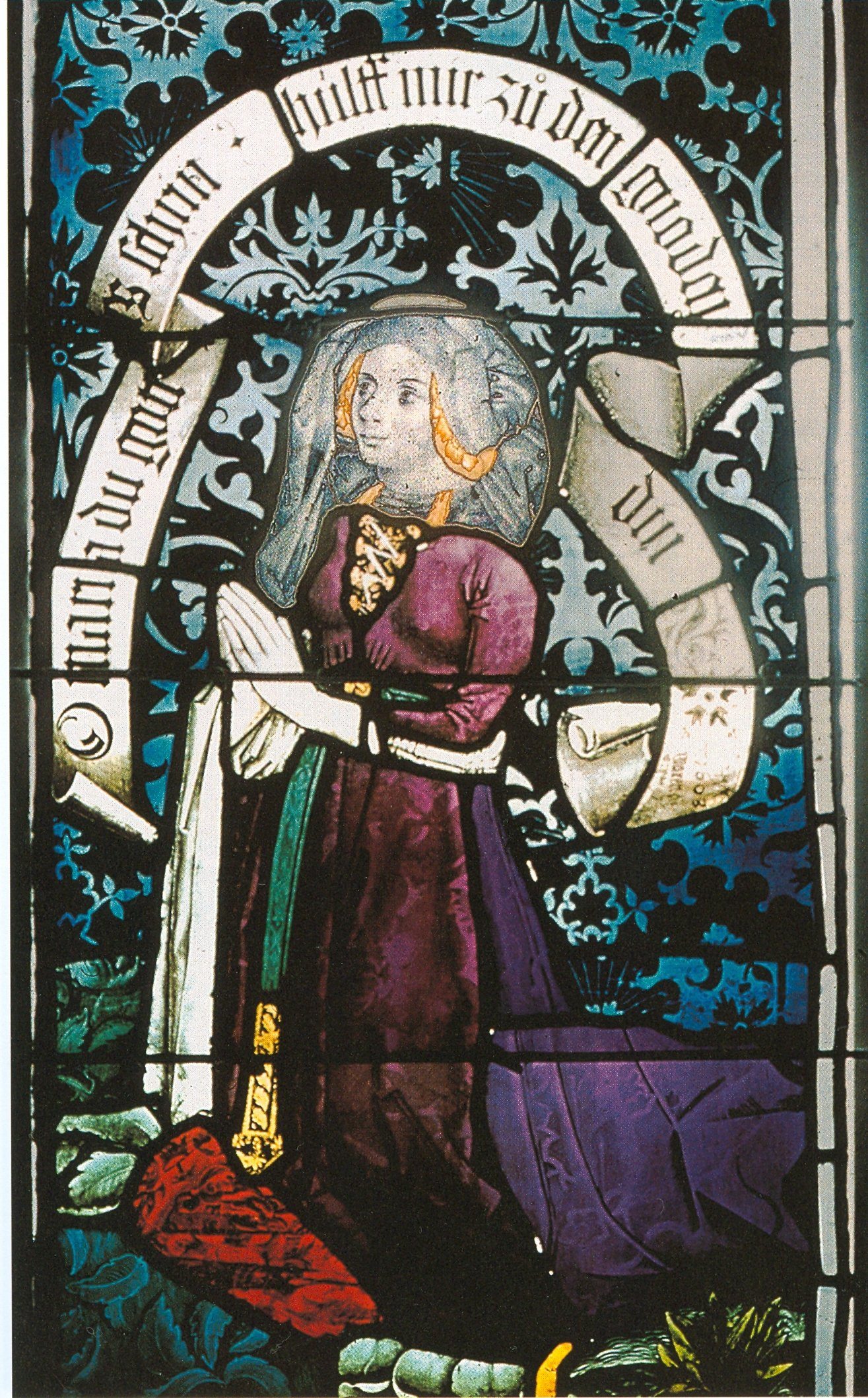 Henriette von Mömpelgard. eingescannt aus: Württemberg und Mömpelgard: 600 Jahre Begegnung. Beiträge zur wissenschaftlichen Tagung vom 17. bis 19. September 1997 im Hauptsaatsarchiv Stuttgart. Herausgegeben von Sönke Lorenz und Peter Rückert. Leinfelden-Echterdingen, 1999, S. 29